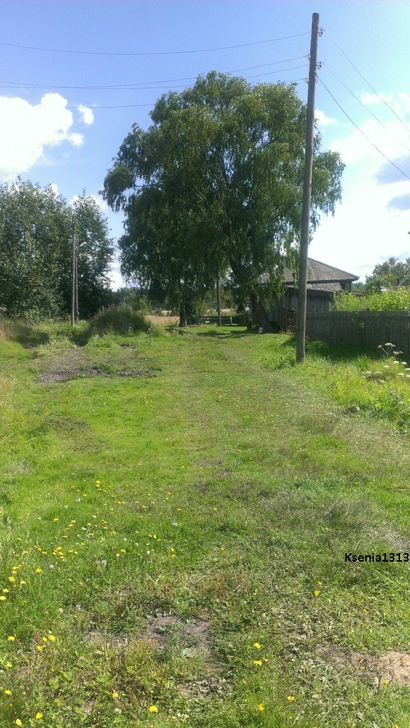 2015 год деревня Тимово